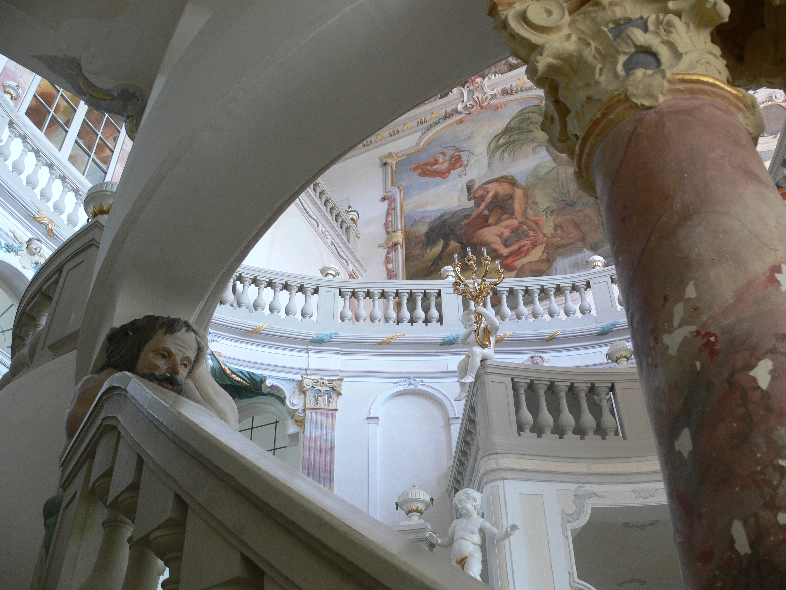 Schloss Wurzach, Bad Wurzach, Baden-Württemberg Treppenhaus, 1723–1728